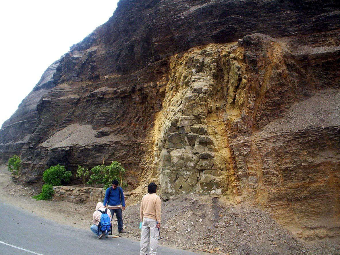 Dique andesítico en Morro Solar, Lima, Perú.